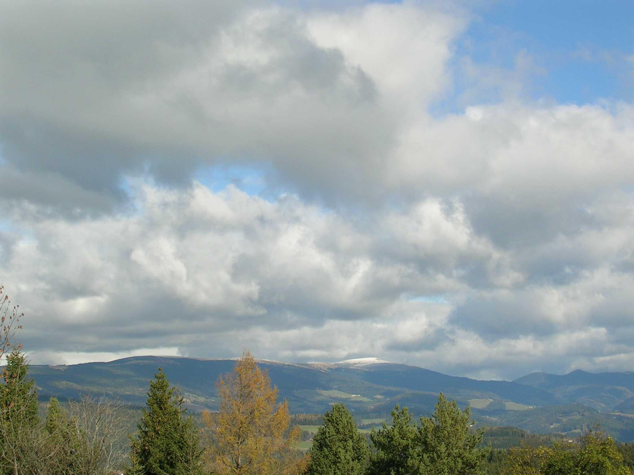 Blick in die Fischbacher Alpen